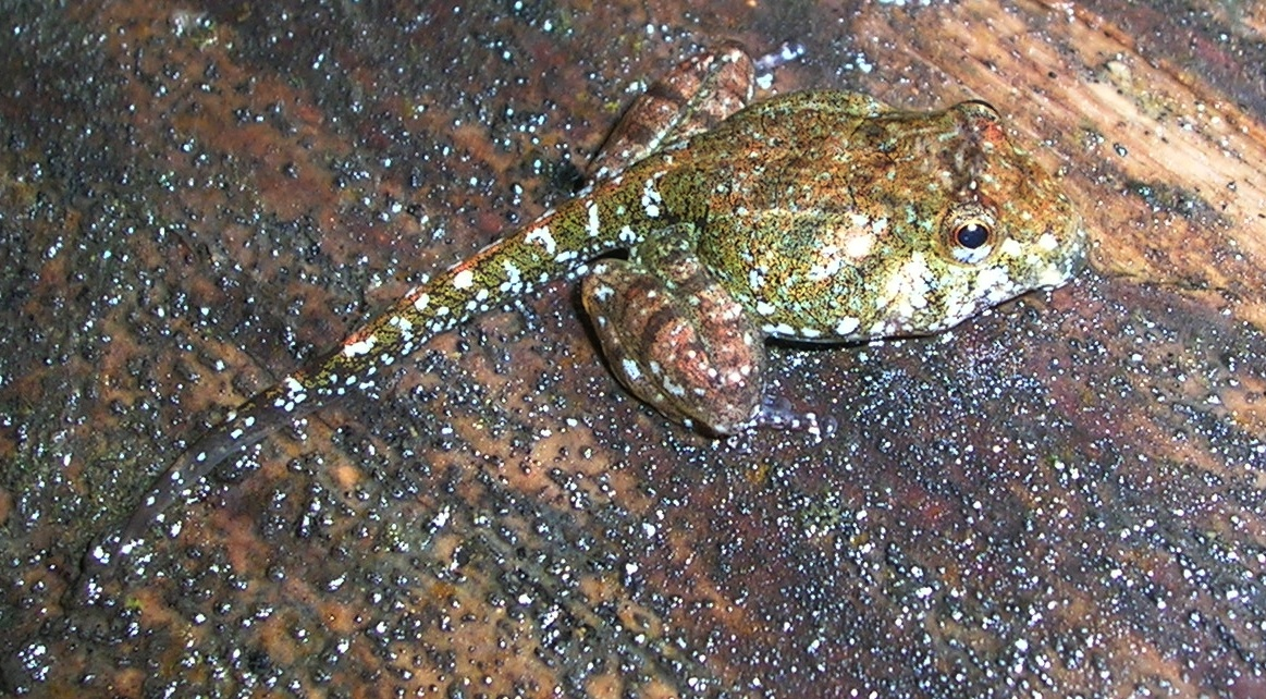 Nouvelle version de File:Tadpole iruppu.jpg (niveaux)